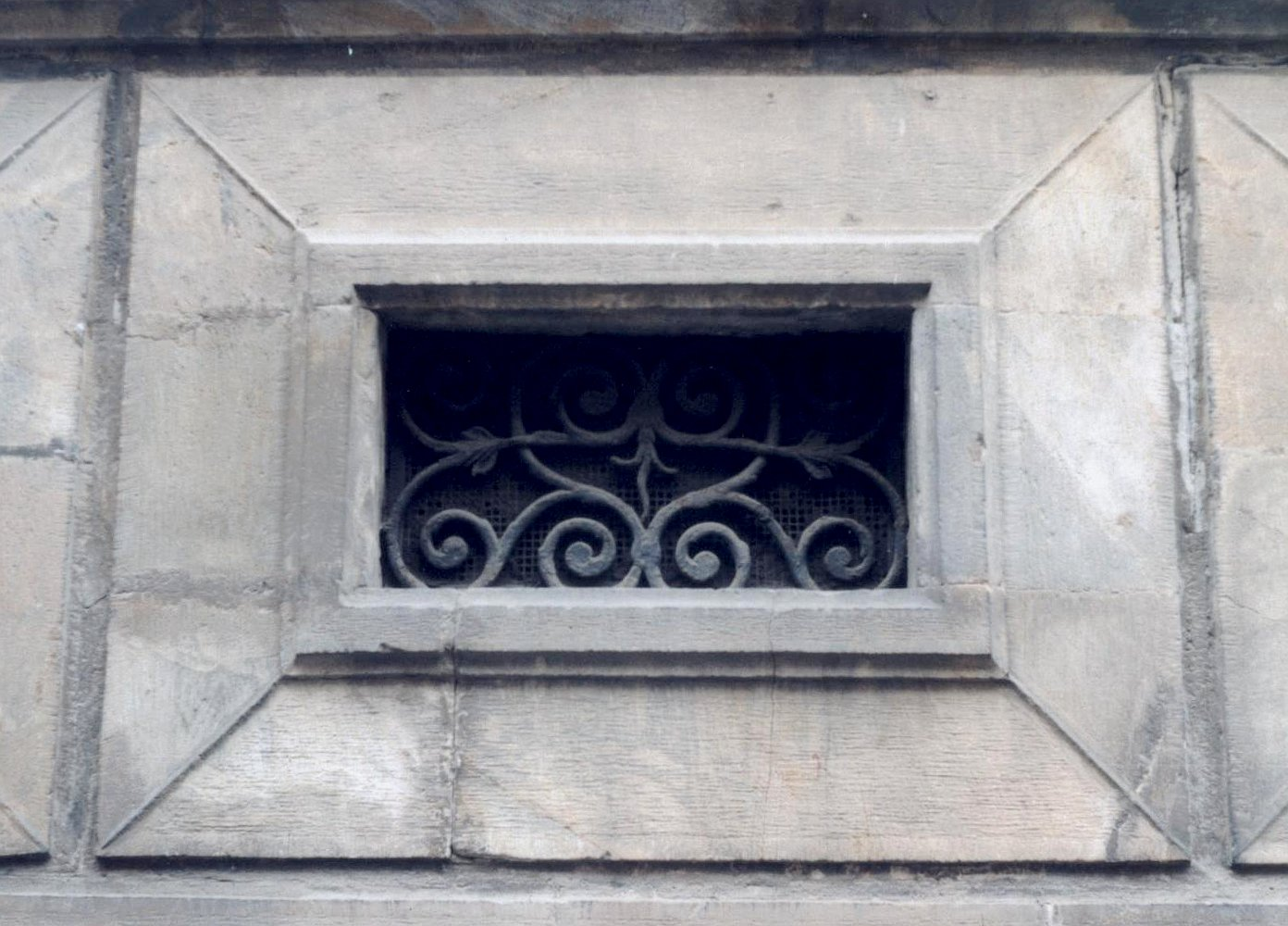 Kolovratský (Thunovský) palác v Praze na Malé straně,architekt: Jan Santini